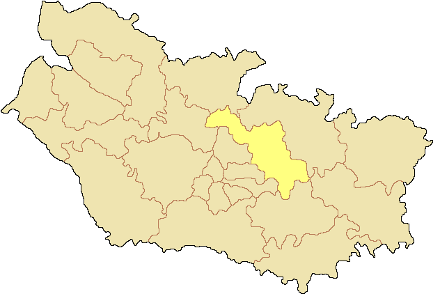 Canton de Corbie dans le département de la Somme